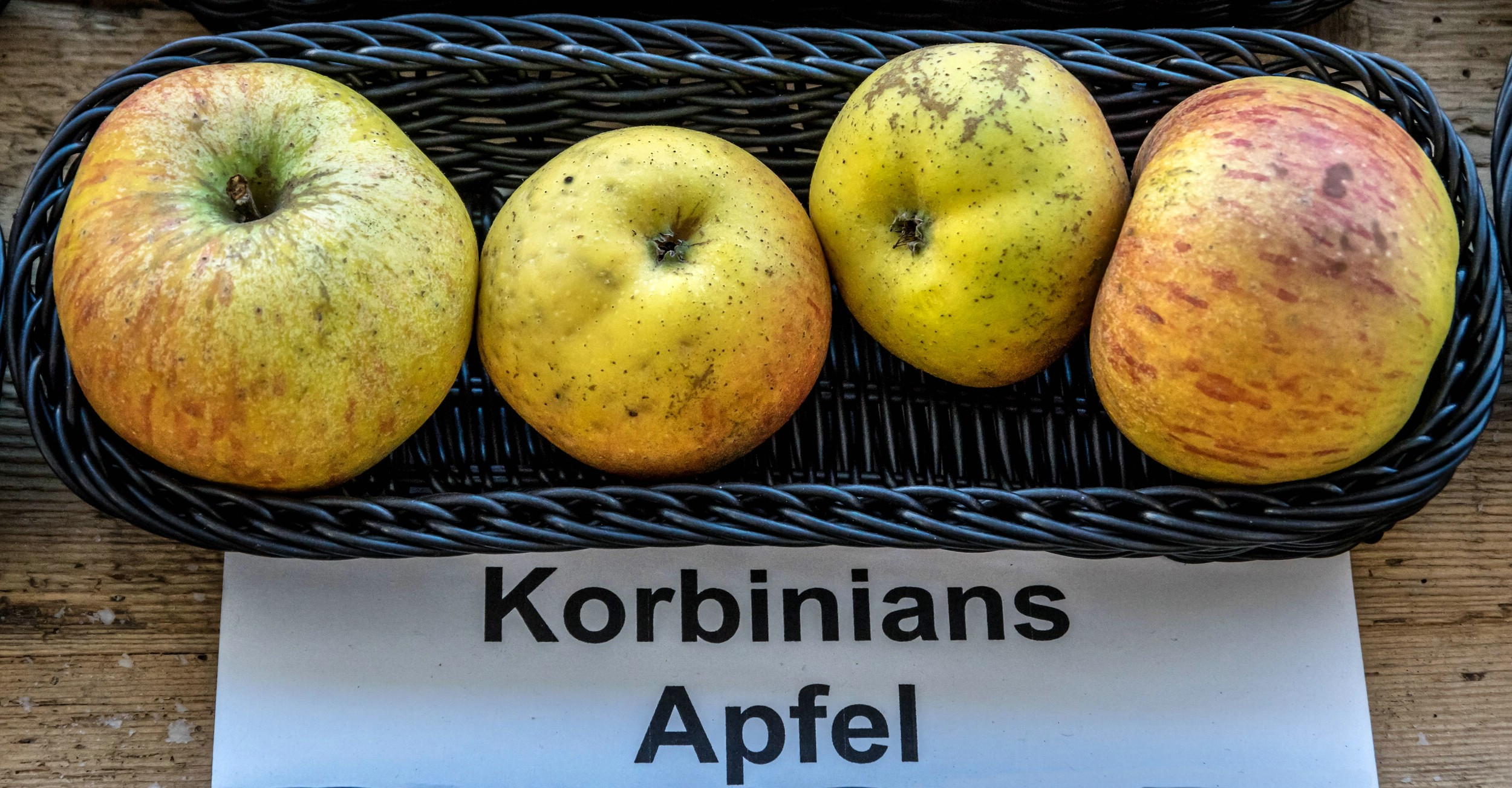 Alte Apfelsorten, von denen es im Badischen noch tragende Bäume gibt. Alle Aufnahmen aus dem Oktober 2015